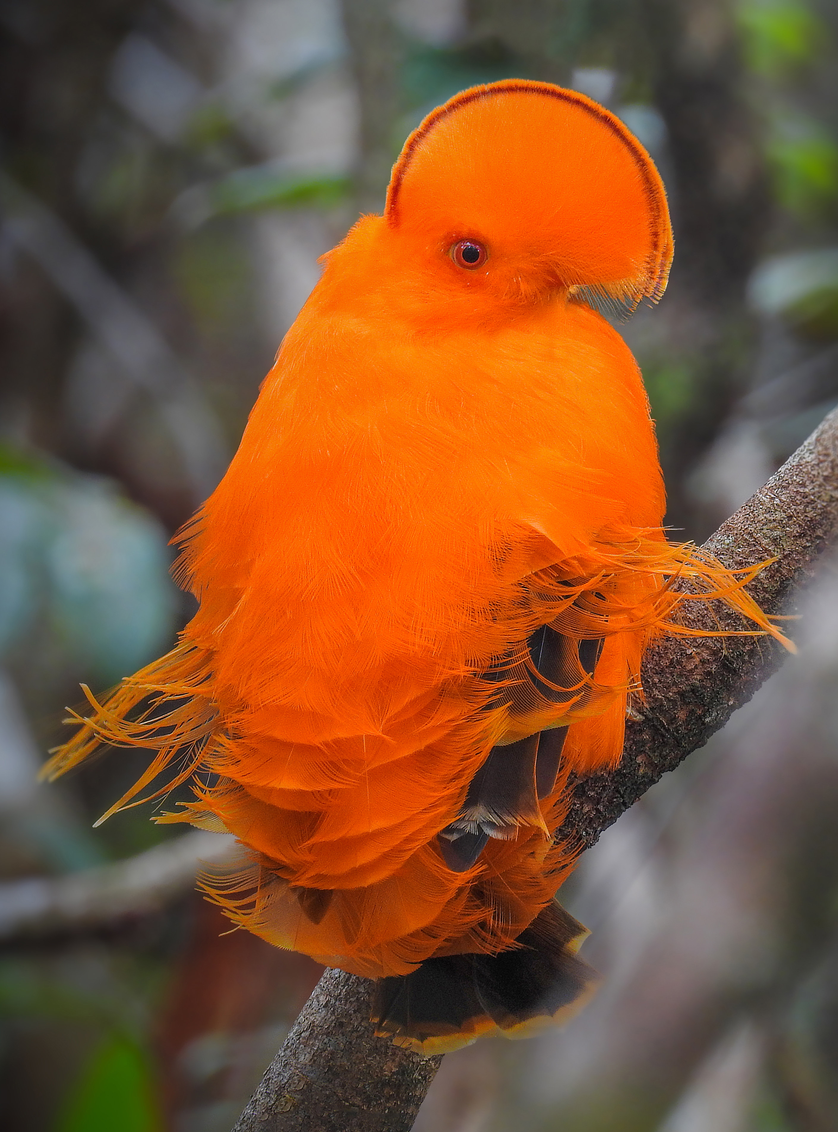 Rupicola rupicola (Linnaeus, 1766) Guianan Cock-of-the-rock Presidente Figueiredo - AM